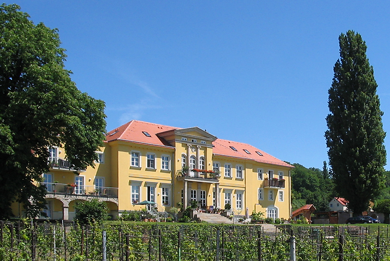 Radebeul, Gebäudegruppe des Paulsberg (Lößnitz), Hauptansicht von Süden